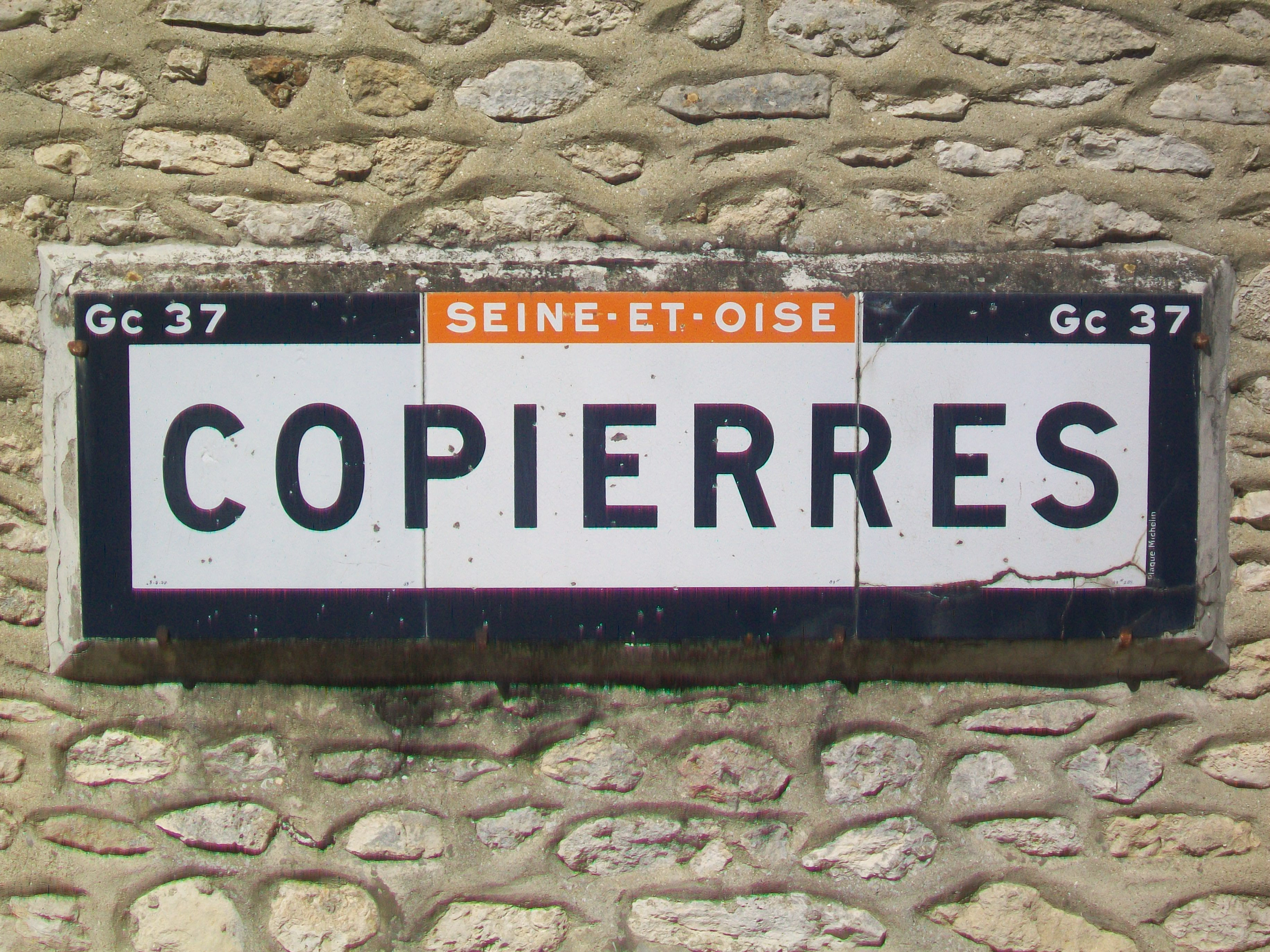 Vieille plaque Michelin sur la RD 37, au milieu (!) du hameau de Copierres.